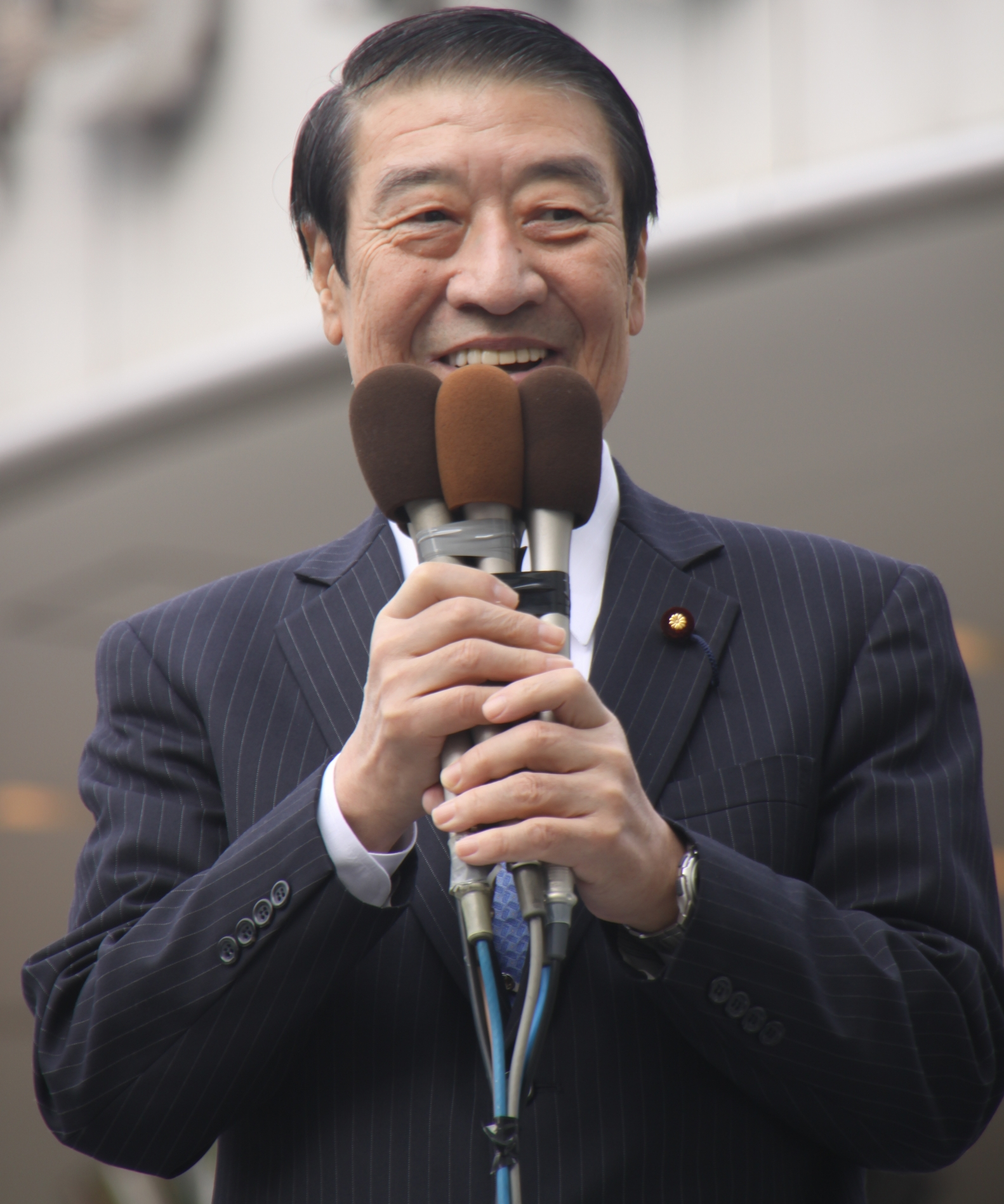 山田正彦。有楽町イトシア前での街頭演説にて撮影。（TPP交渉参加に反対する街頭演説会） Masahiko Yamada